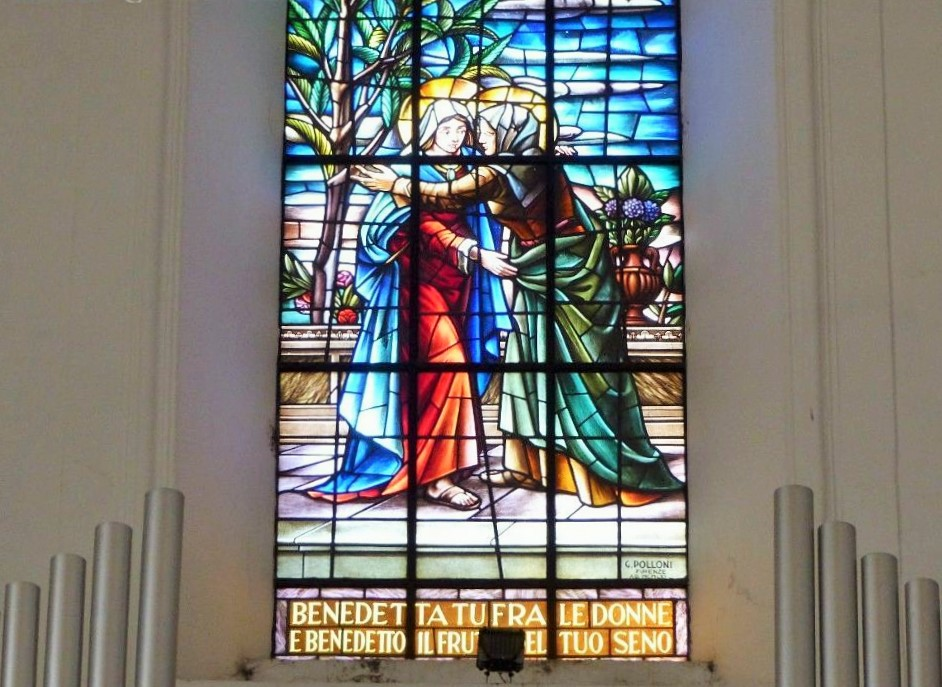 Parrocchia Maria Ss. delle Grazie - navata vetrata